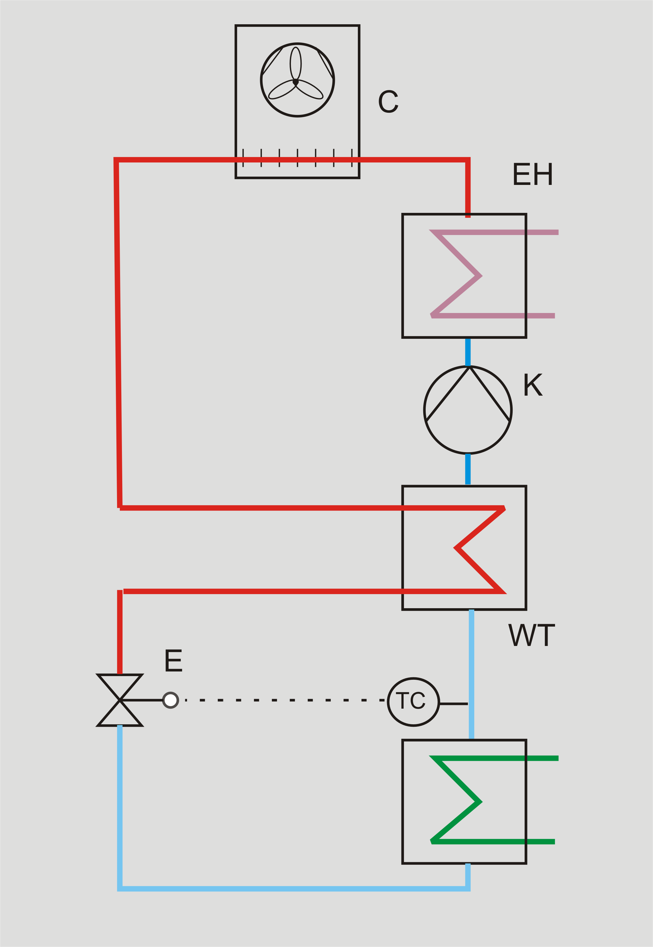 Kälteanlage mit internem Wärmeübertrager